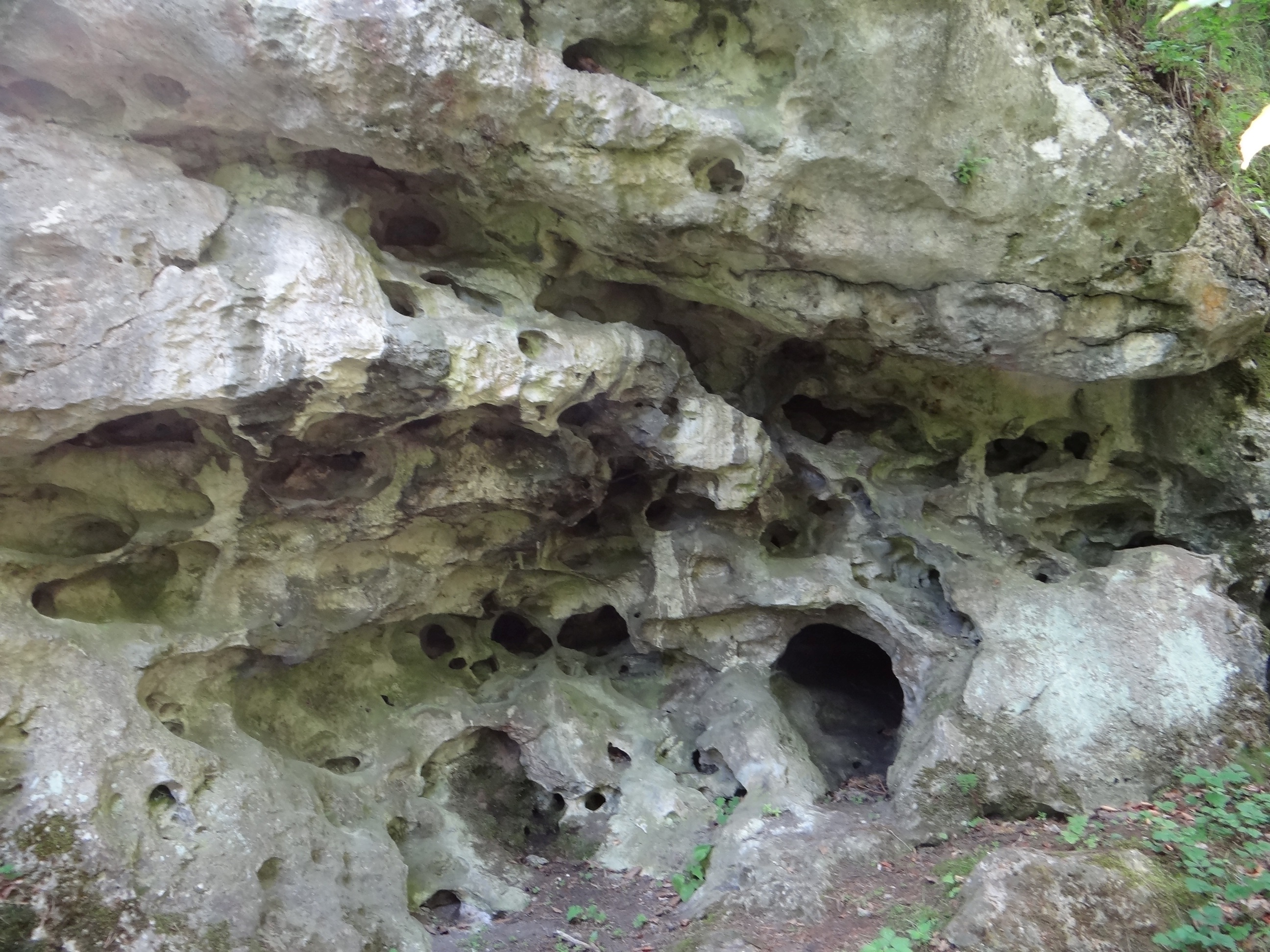 Wapienne skałki na wzgórzu Słupsko